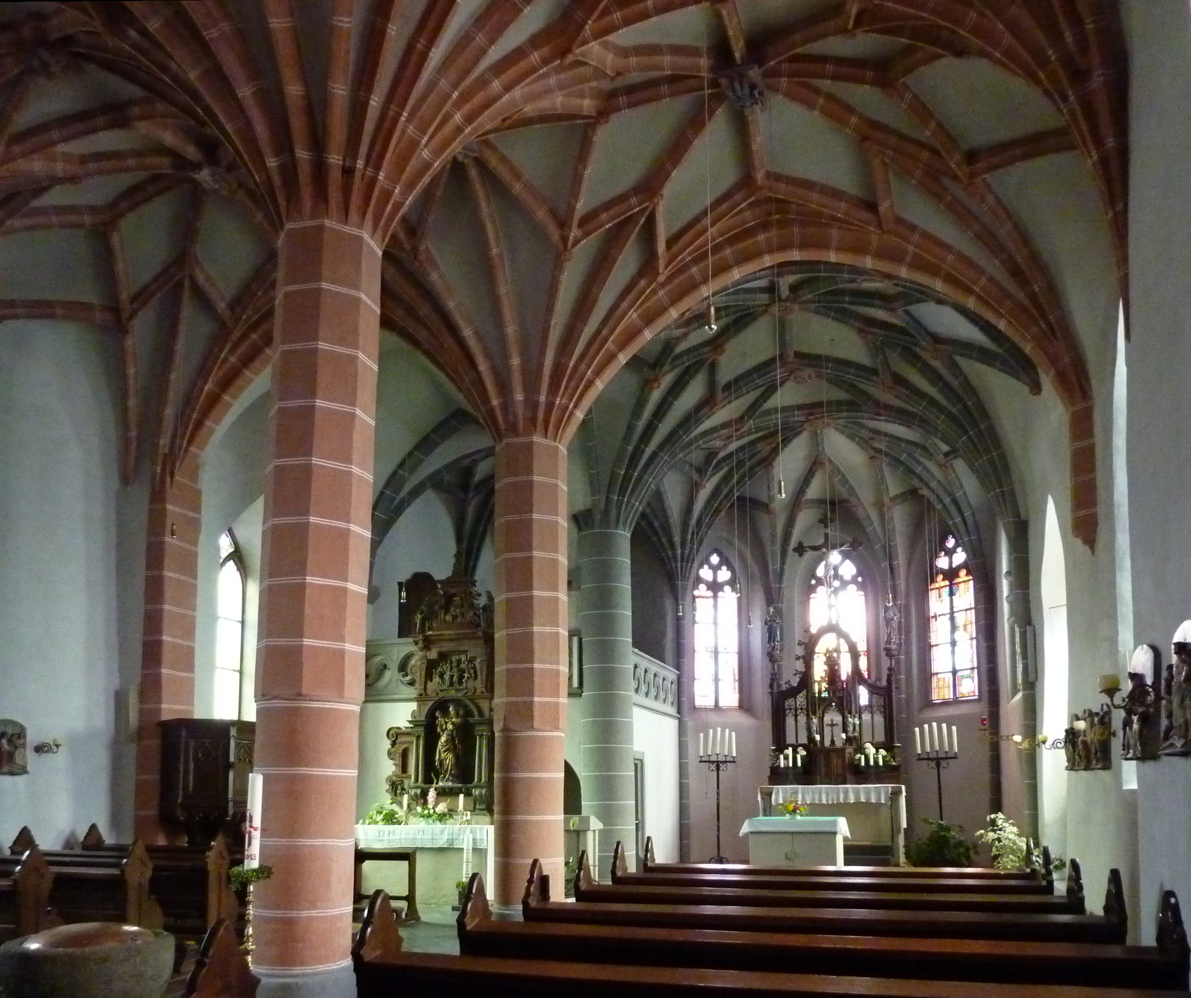 Baasem, Hüttenstr. 2, kath. Pfarrkirche, innen, Südschiff n. O